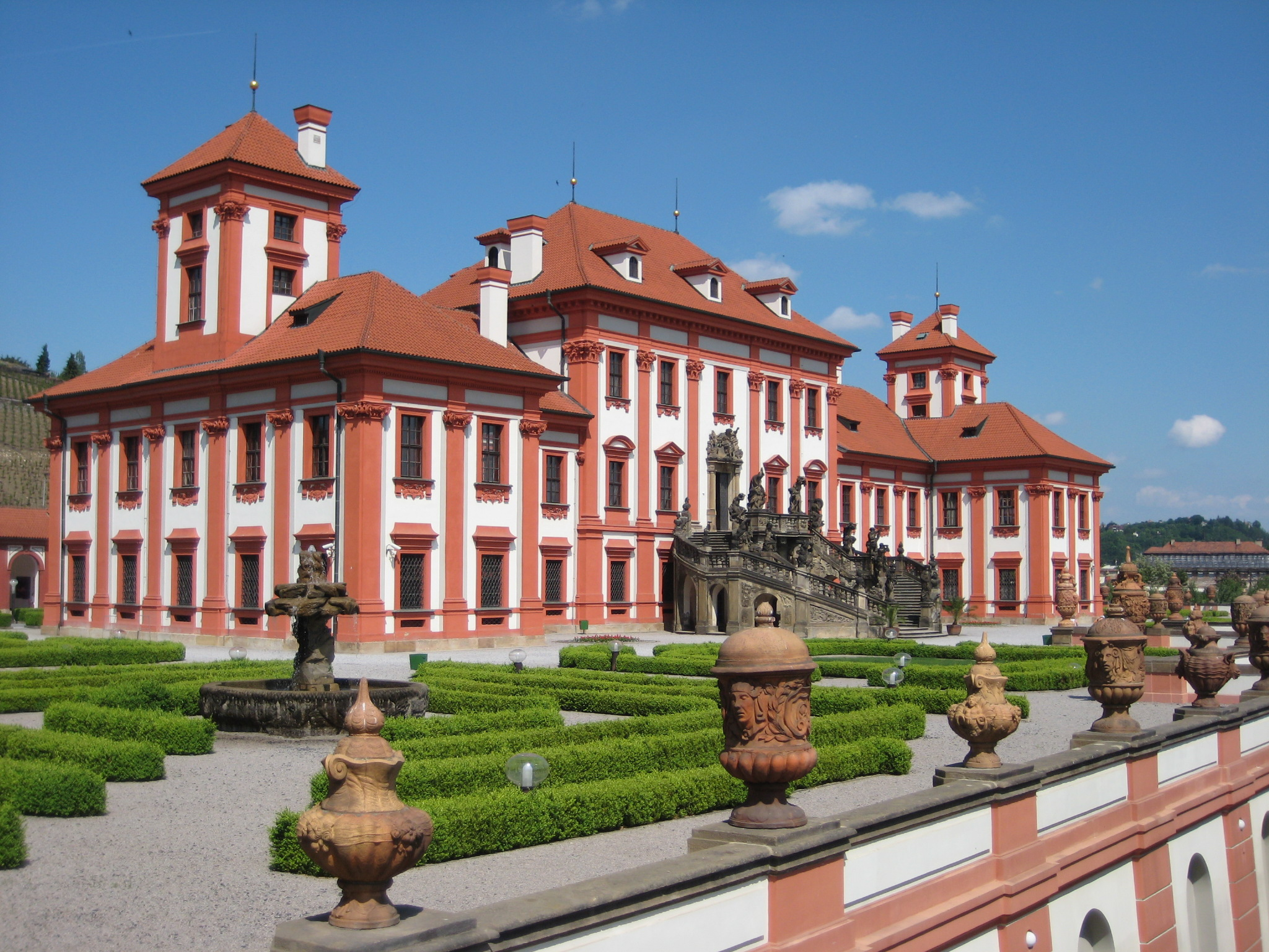 Schloss Troja, Prag